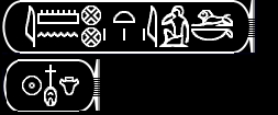 Aman-nete-yerike y Nefer-ka-re (nombres de nacimiento y real)